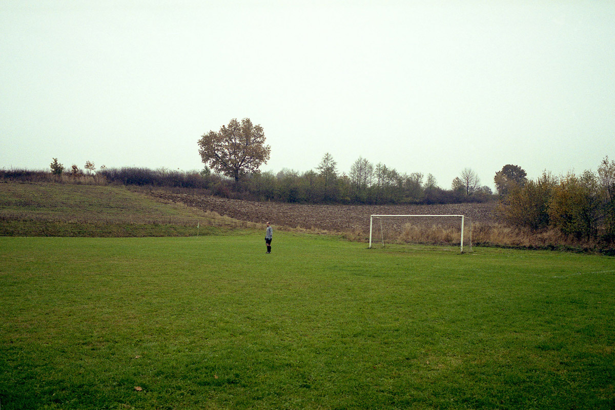 Tomáš Pospěch´s photography